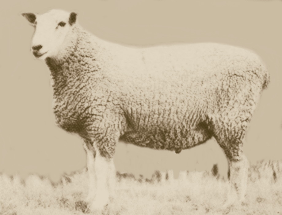 A Gromark ram